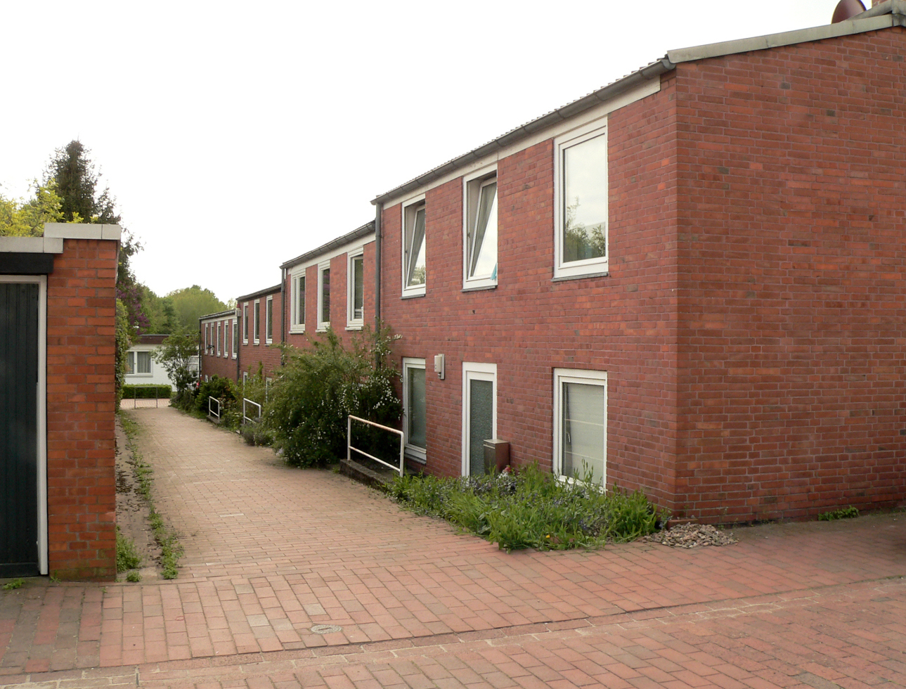 Wohnhäuser an Fußweg im Morgensternweg in Hannover Herrenhausen